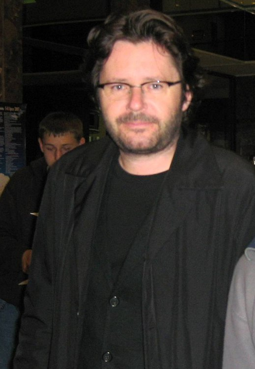 Grzegorz Turnau (ur. 31 lipca 1967 w Krakowie) - polski artysta, aranżer, pianista, kompozytor i poeta